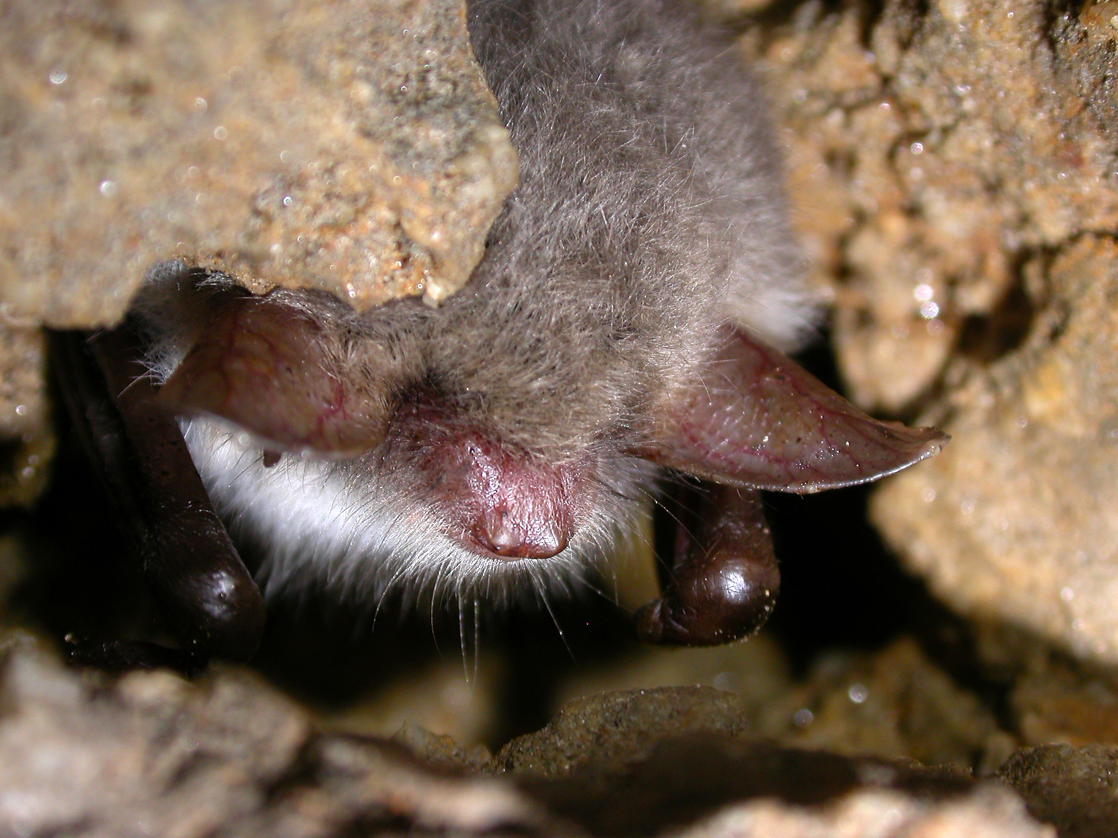 Myotis nattereri